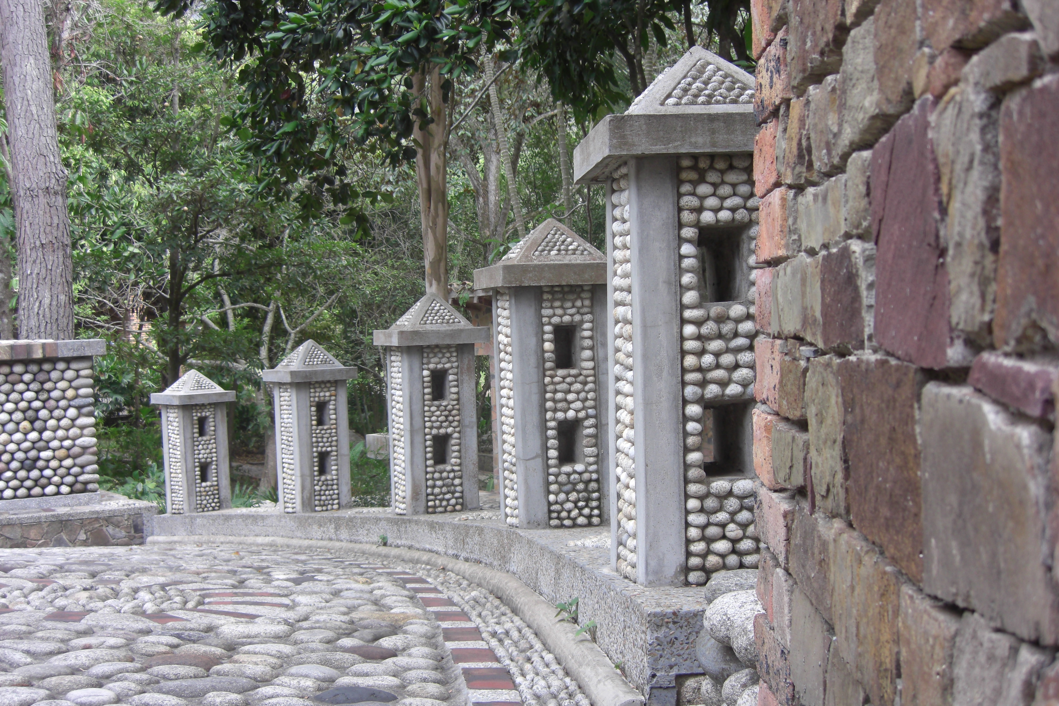 Paseo por uno de los castillos que están en las cercanías del pueblo de colon